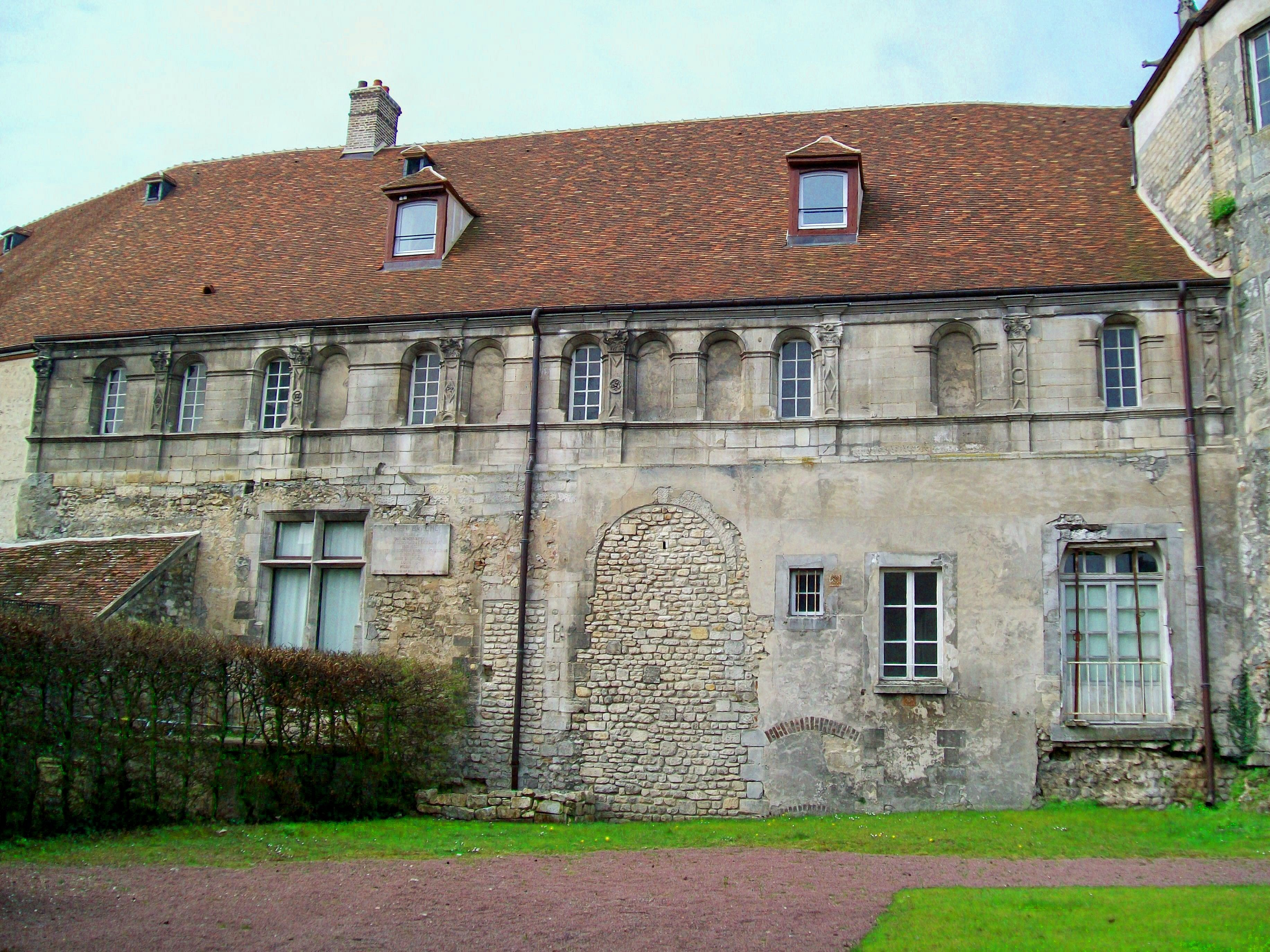 Vue rapprochée de la façade nord-est, partie la plus ancienne du complexe datant du XIIIe siècle. Le mur du rez-de-chaussée est le rempart gallo-romain, méconnaissable en raison des modifications.